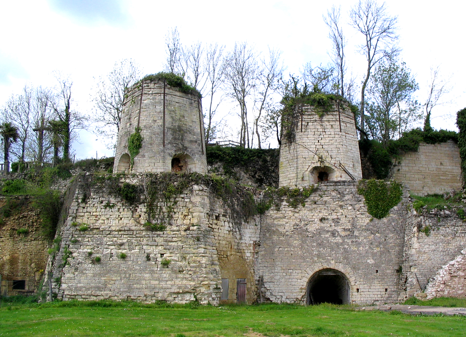 Foussais-Payré, France: four à chaux